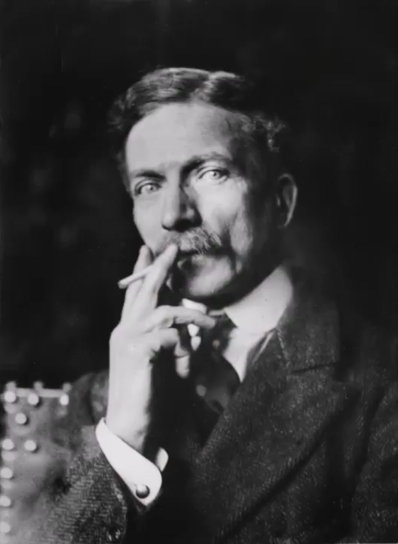 Jean Baptiste Discart